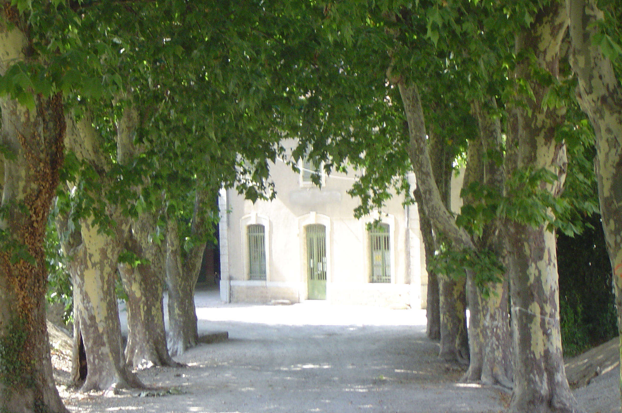 Gare de Langlade, photo personnelle de Nicolas Cadène, 14/10/2006, reproduction identique autorisée sur Wikipedia